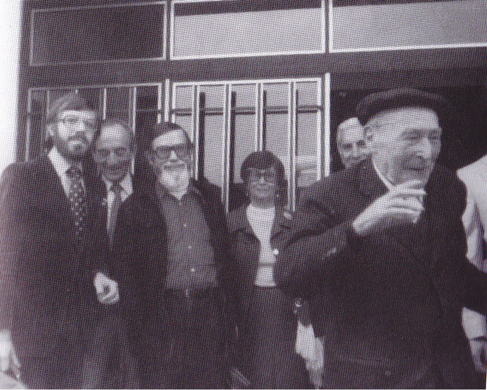 Josep Pla sortint de l'institut.